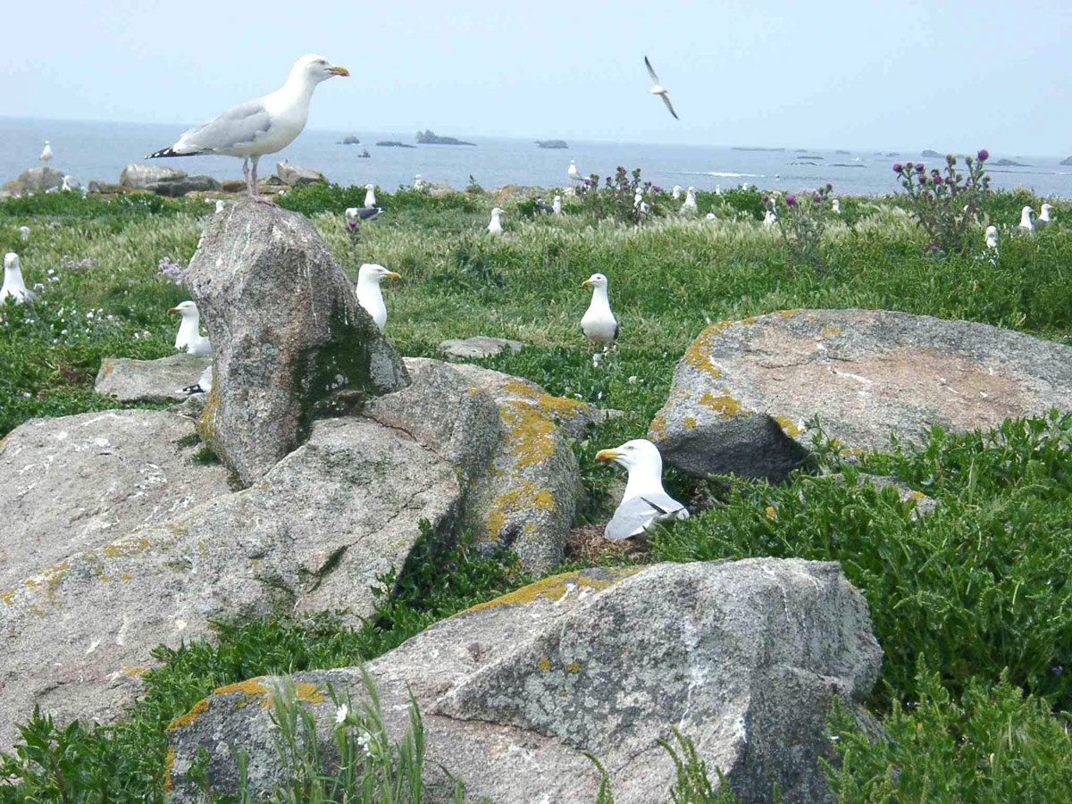 Description : Goélands Larus argentatus en train de nidifier dans l'ile du Loch aux Glénans Lieu : Ile du Loch, Archipel des Glénans, Bretagne, France Auteur : Pline Photo personnelle